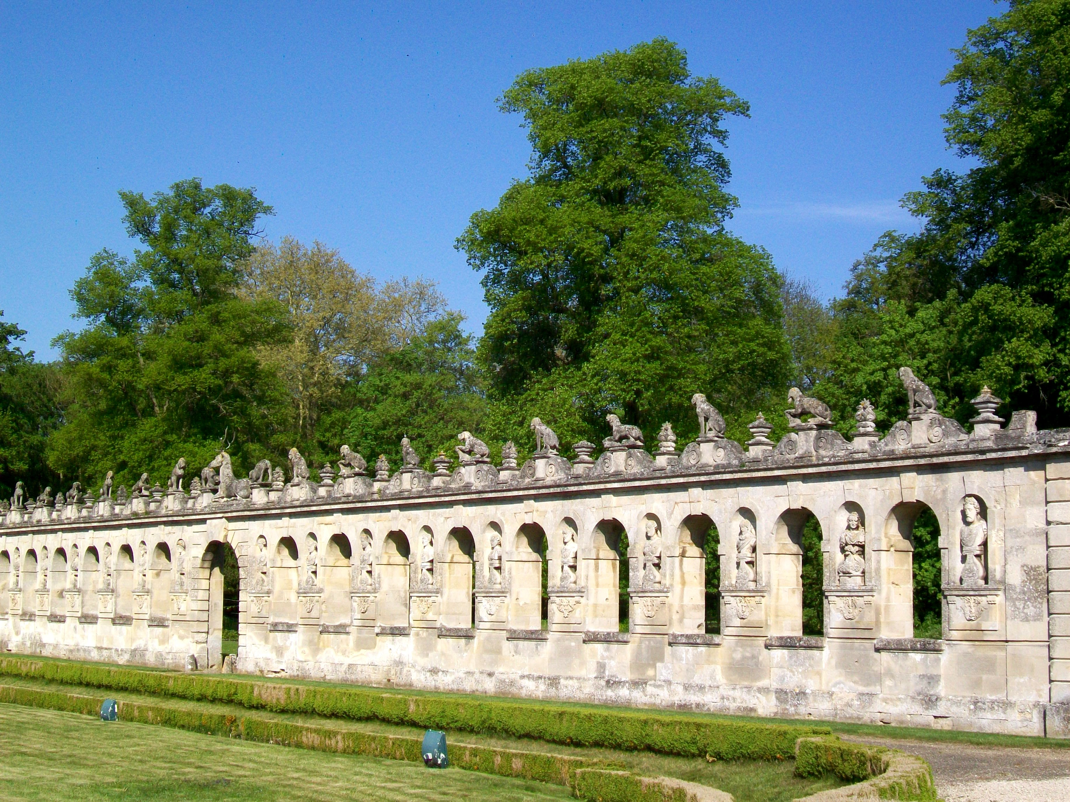 « Haie cynégétique » sur la cour d'honneur du château de Raray. Il y a deux galeries de ce type, du XVIIIe siècle ; chacune étant articulée autour d'un portail surmonté d'un cerf couché au milieu, avec dix chiens sur la corniche de chaque côté, et également dix niches abritant de bustes d'empereurs et impératrices romains, et de divinités grecques.